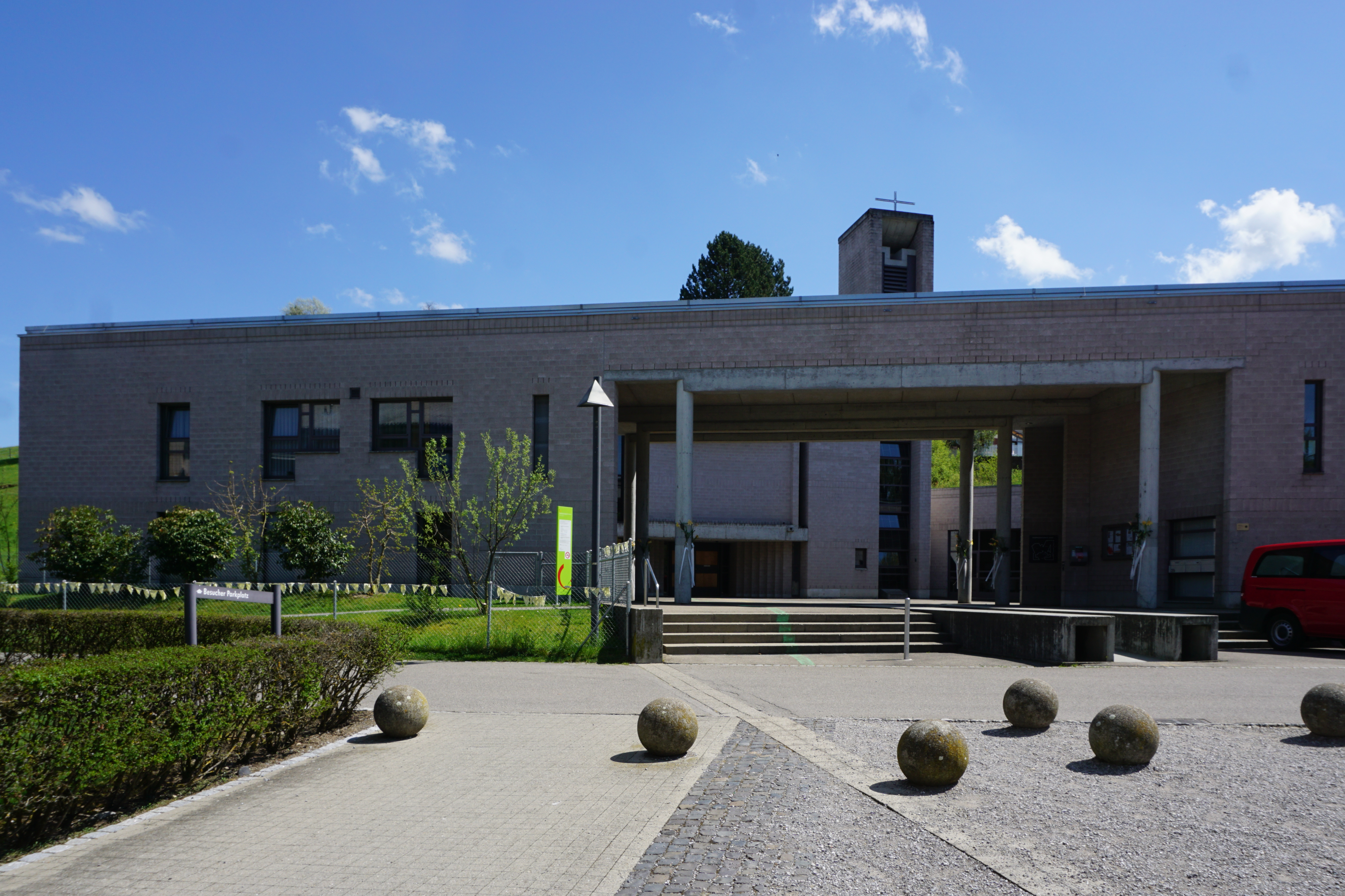 Ansicht vom Dorfplatz zum Kirchenzentrum